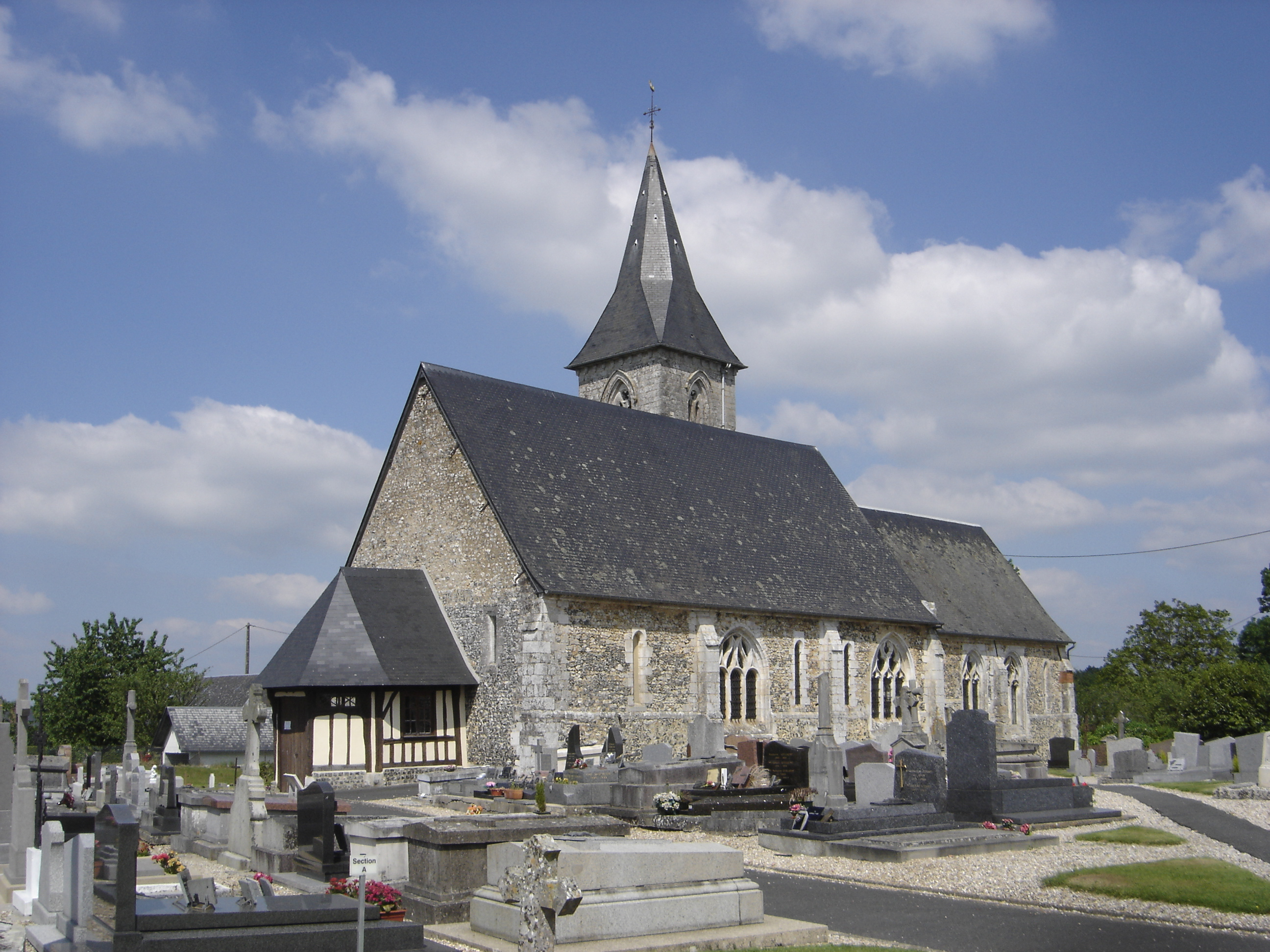 église Notre-Dame, à Selles (Eure - France)